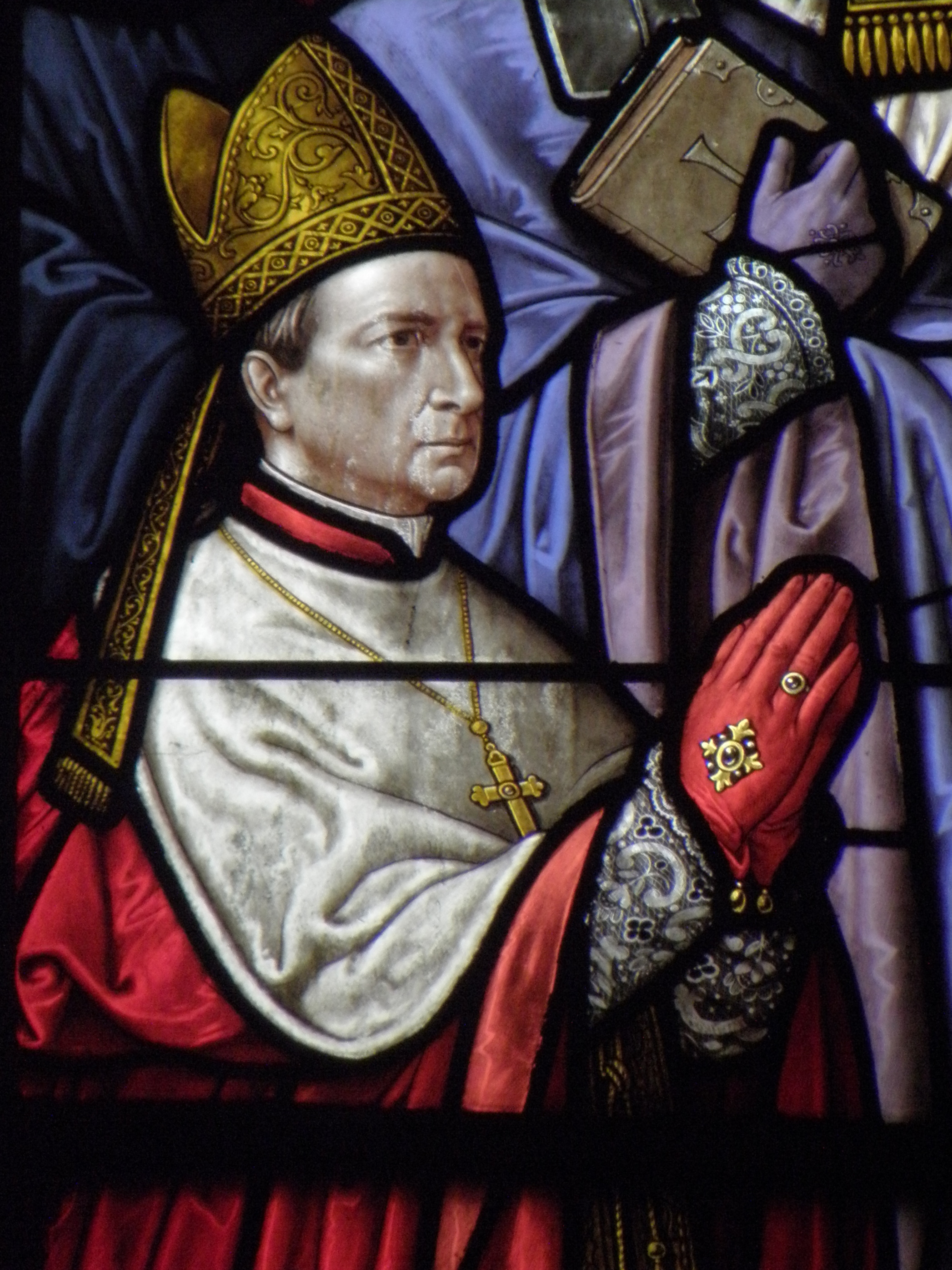 Mgr Charles Philippe Place, cardinal archevêque de Rennes. Vitrail de l'église Saint-Pierre et Saint-Louis de Bédée (35).